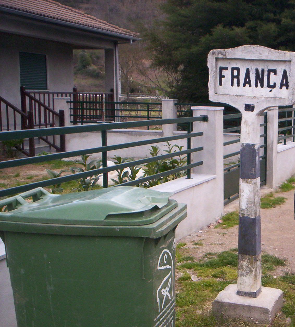 Placa sinalizando a entrada em França, em Bragança, em Portugal.